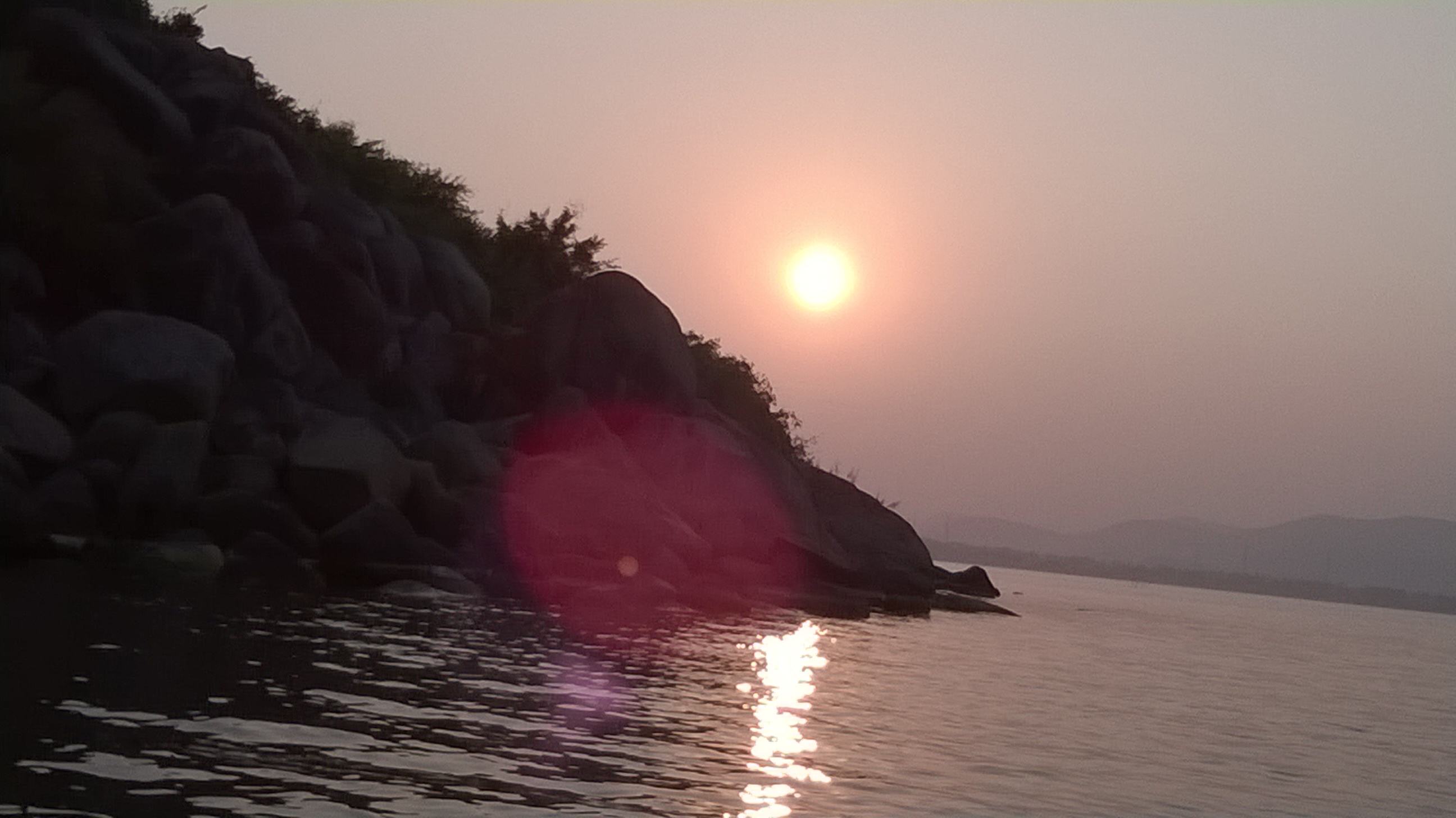 চিল্কাহ্রদে সূর্যাস্ত, রম্ভা, উড়িষ্যা।